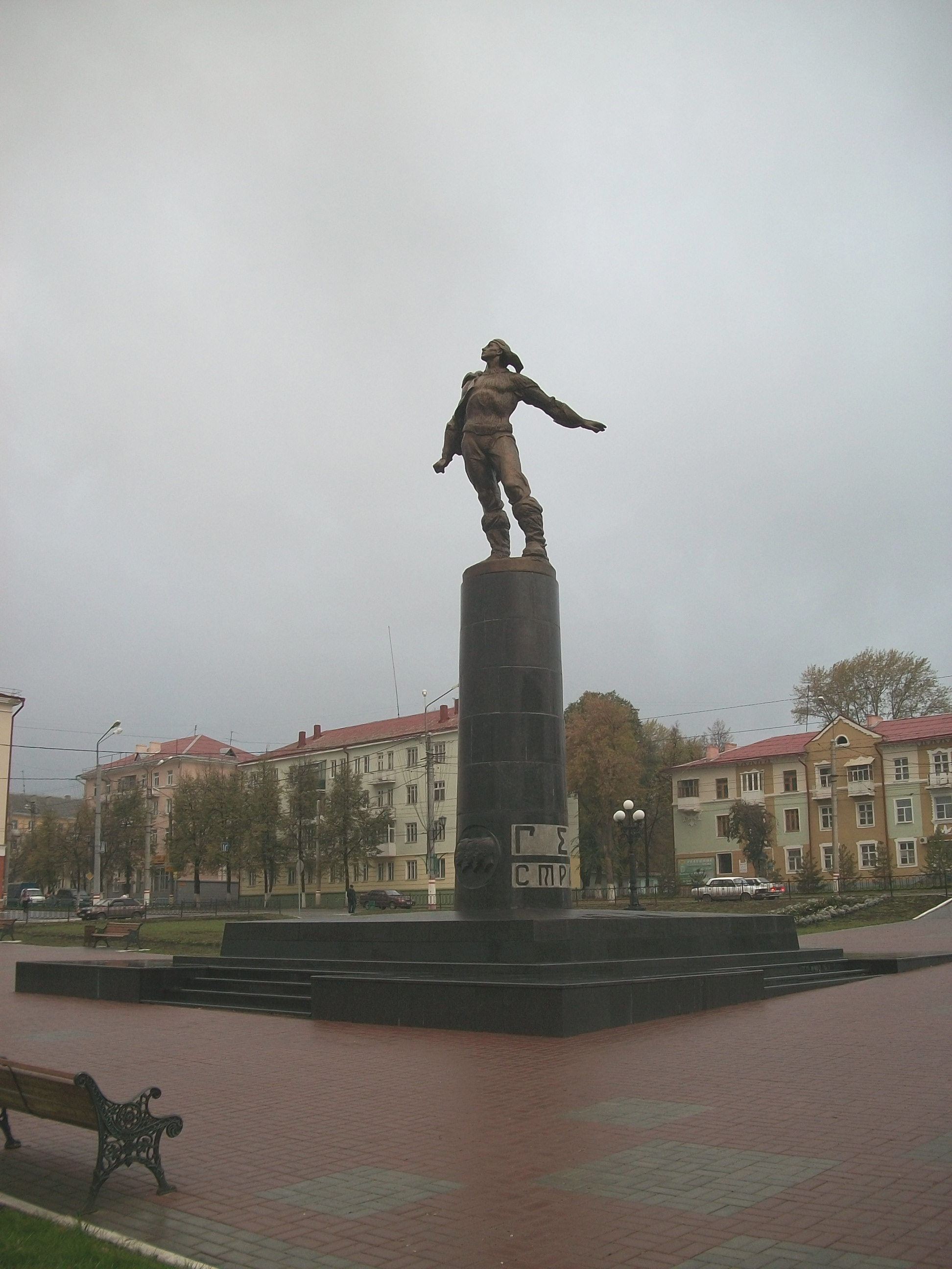 Памятник героям — стратонавтам Павлу Федосеенко, Андрею Васенко и Илье Усыскину, погибшим при аварии стратостата «Осоавиахим — 1».